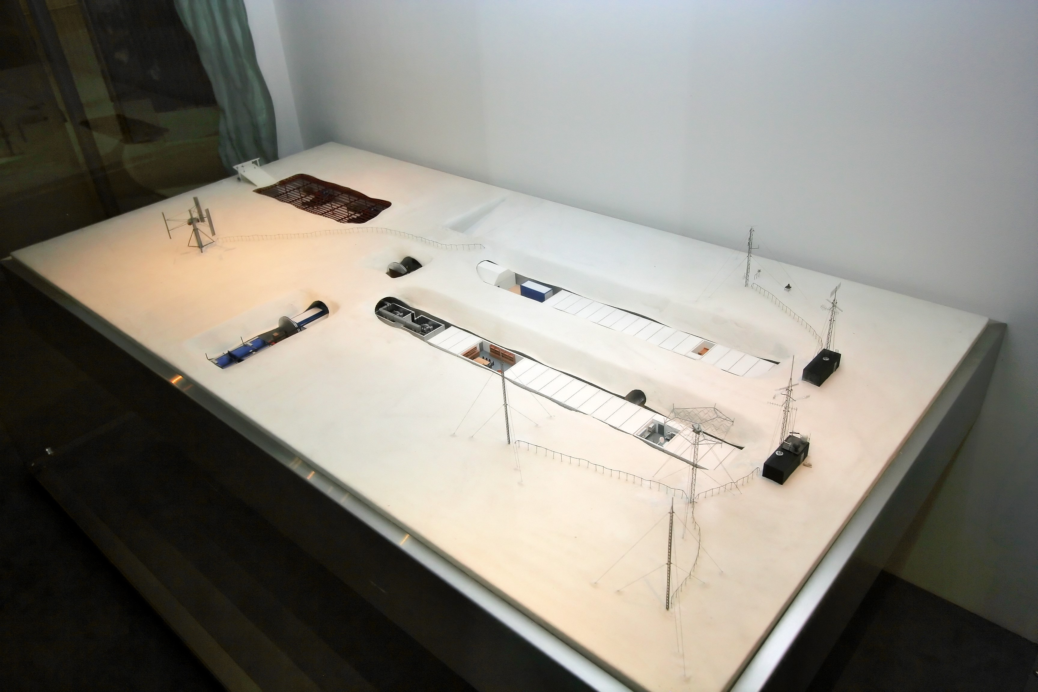 Modell der Neumayer Forschungsstation (Deutsches Museum Bonn)